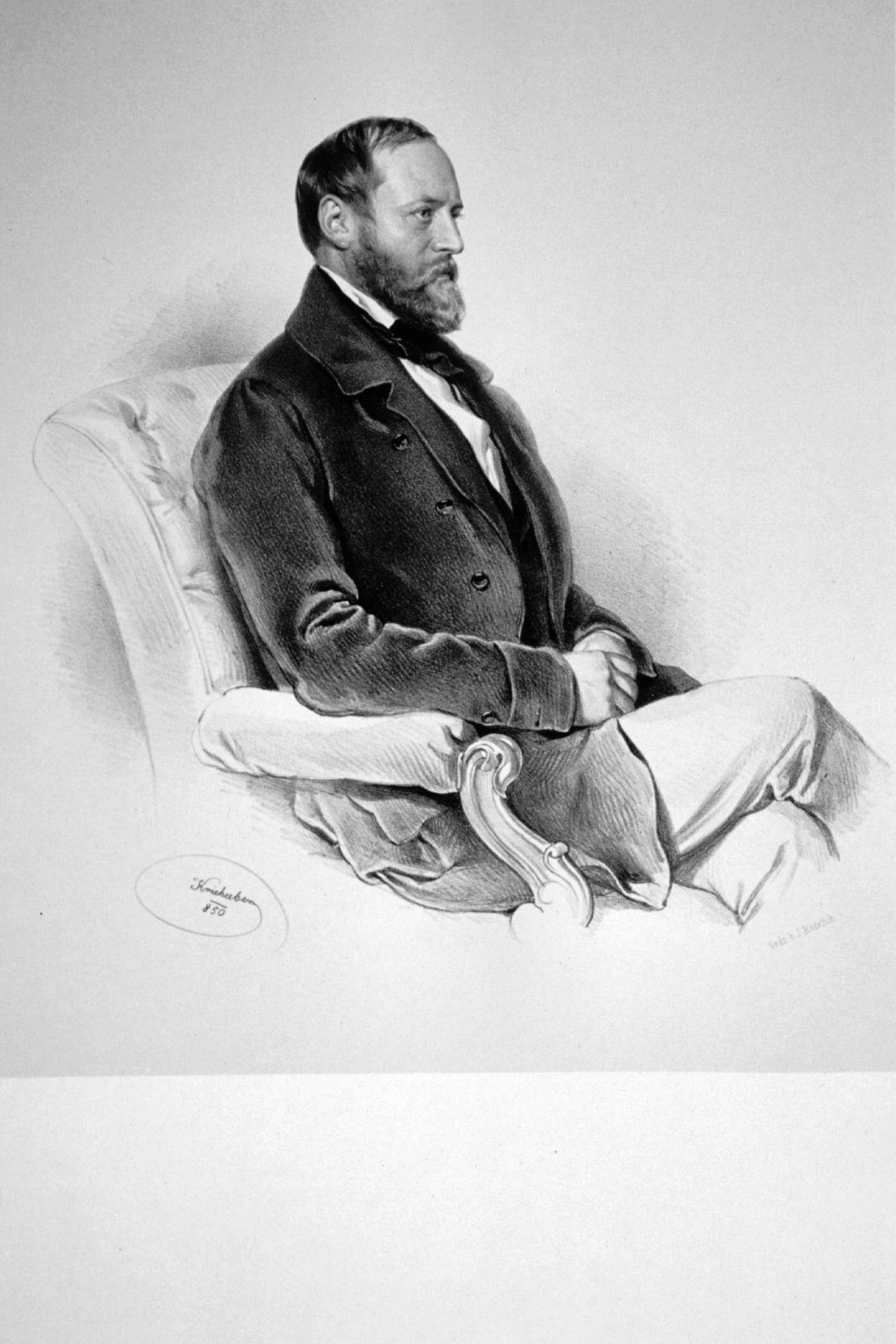 Leopold Mayr (1808-1866), Architekt, Baumeister, Vizebürgermeister von Wien. Lithographie von Josef Kriehuber, 1850